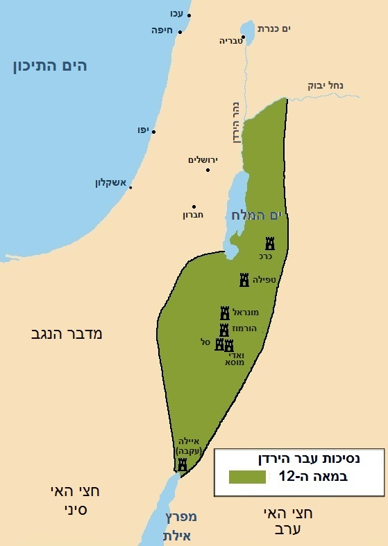 נסיכות עבר הירדן במאה ה-12